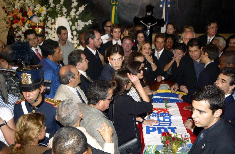 Velório de Leonel Brizola no Palácio Guanabara.